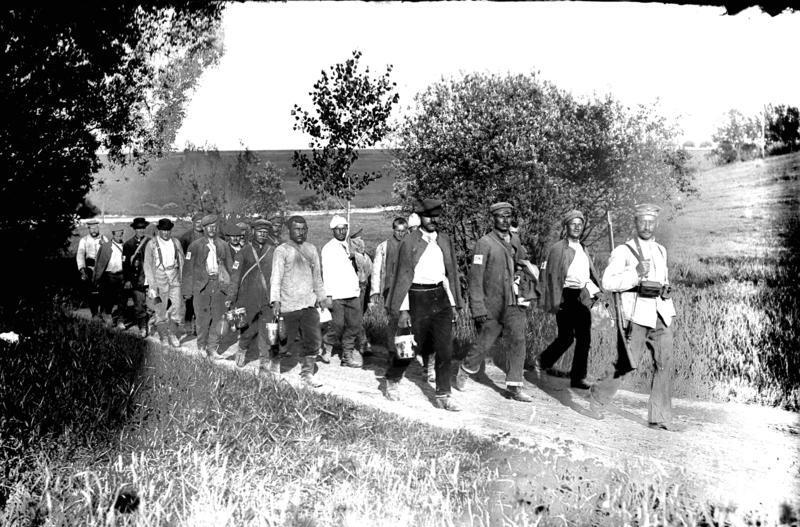 I. Weltkrieg 1914-1918 Gefangene Russen auf dem Weg zur Feldarbeit; Juli 1915